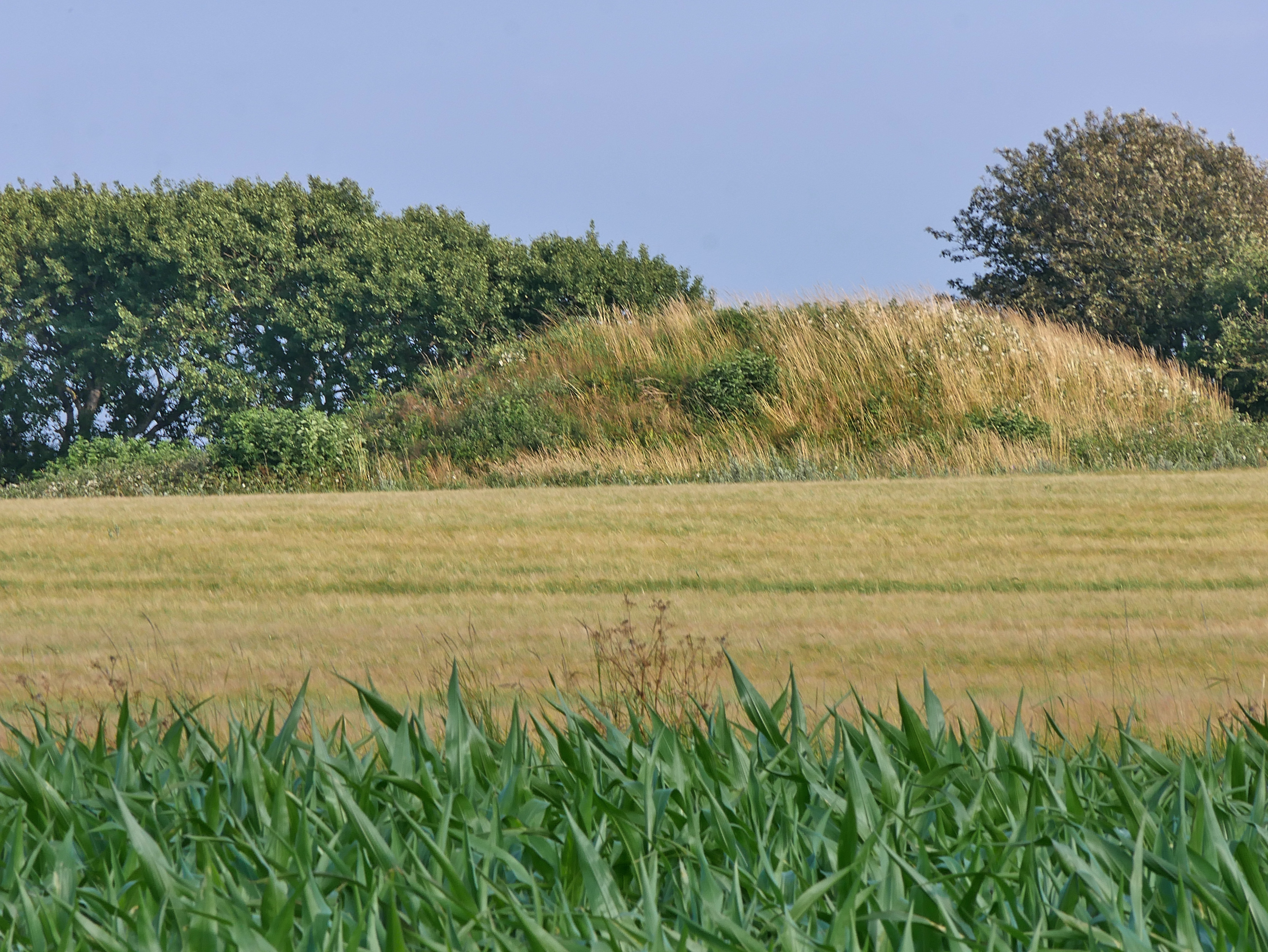 Dolmen Nord in Tostrup von Westen